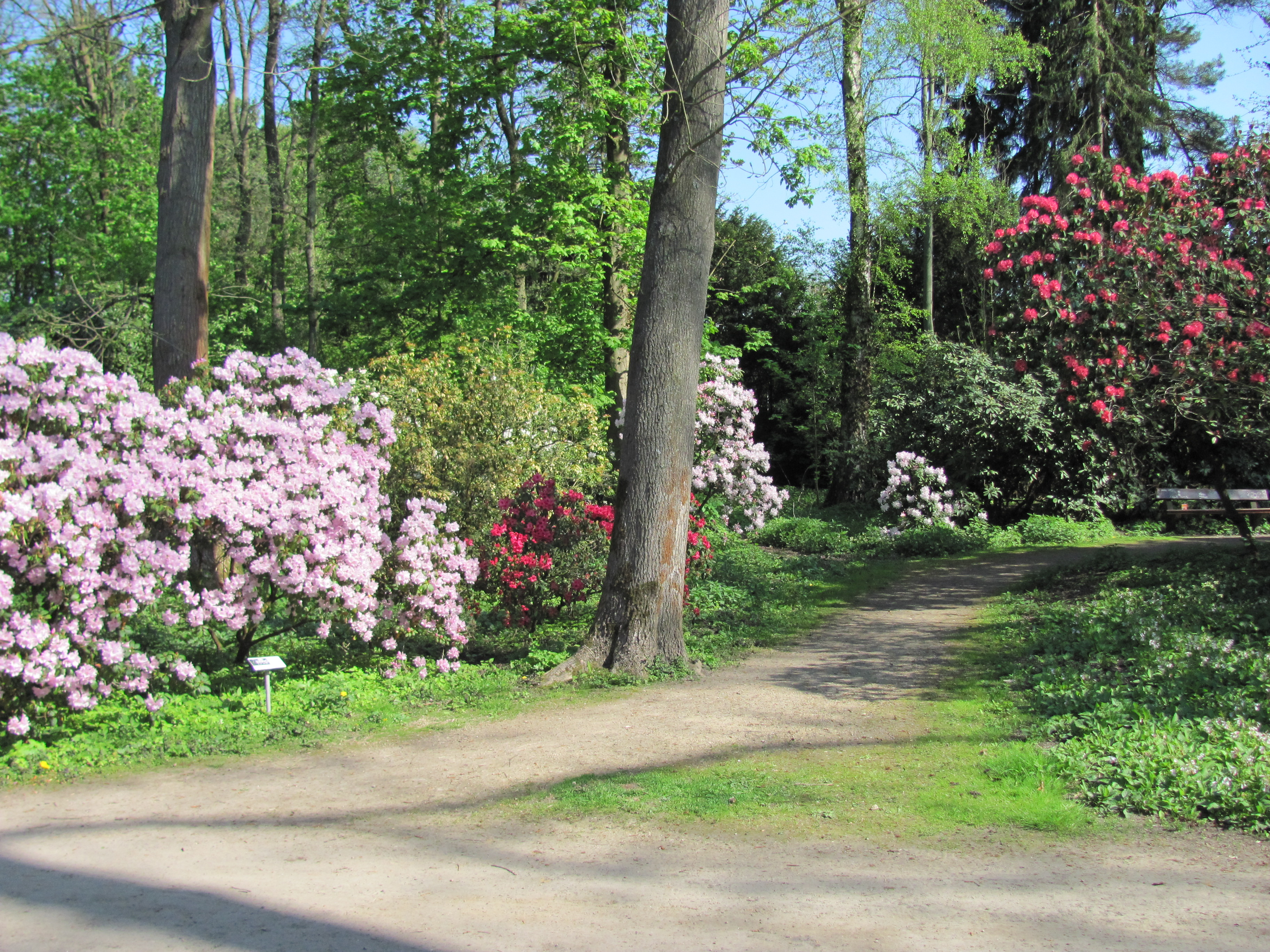 Stadtpark Hamburg im Mai